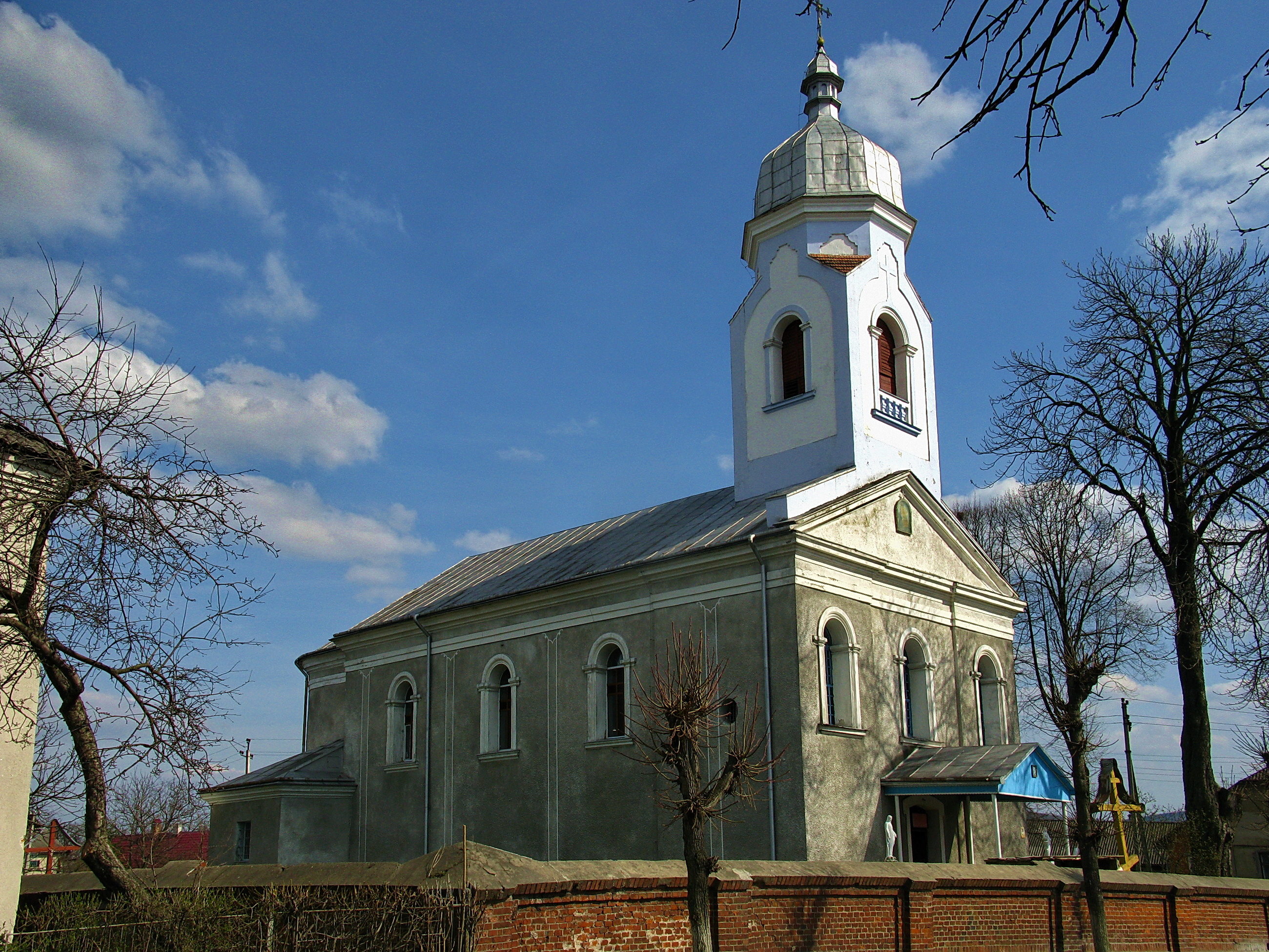 Церква Різдва Пресвятої Богородиці (мур.), Хирів, вул. Добромильська,28